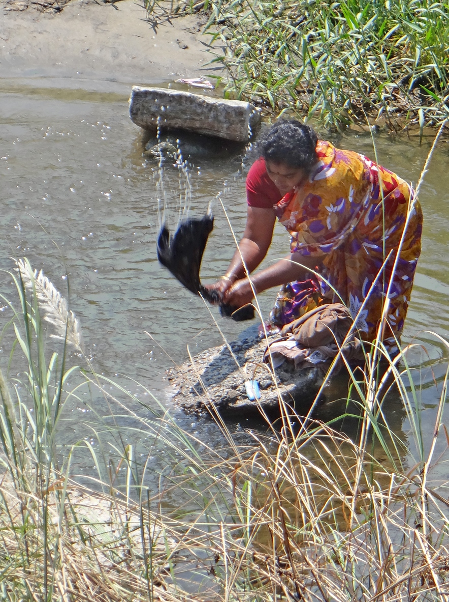 Le lavage du linge dans la rivière Mullaiperiyar à Uthamapalayam dans l'Etat du Tamil Nadu.